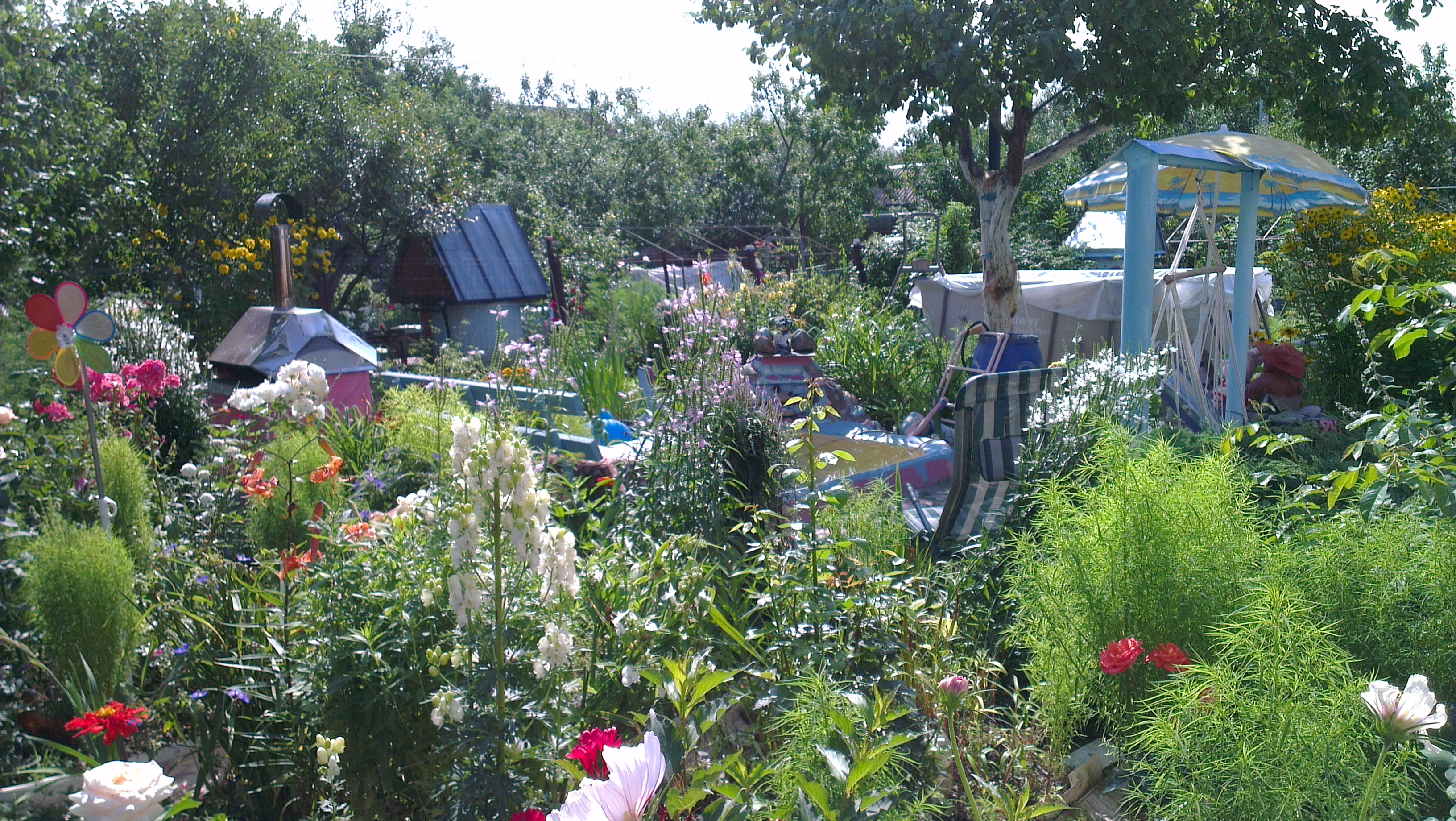 Kalininets, Moskovskaya oblast', Russia, 143160